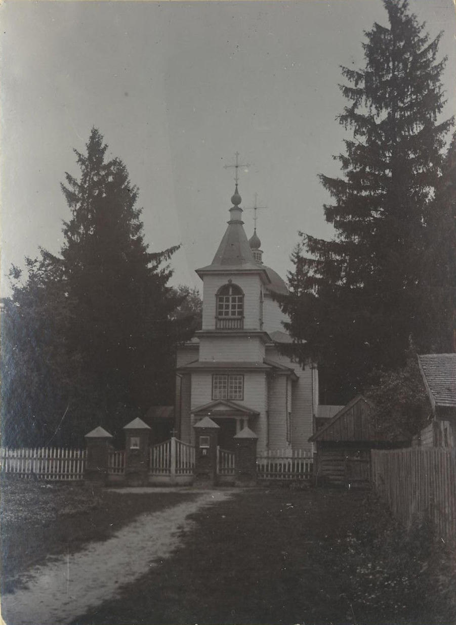 Беларуская (тарашкевіца): Горваль (Horval). Царква